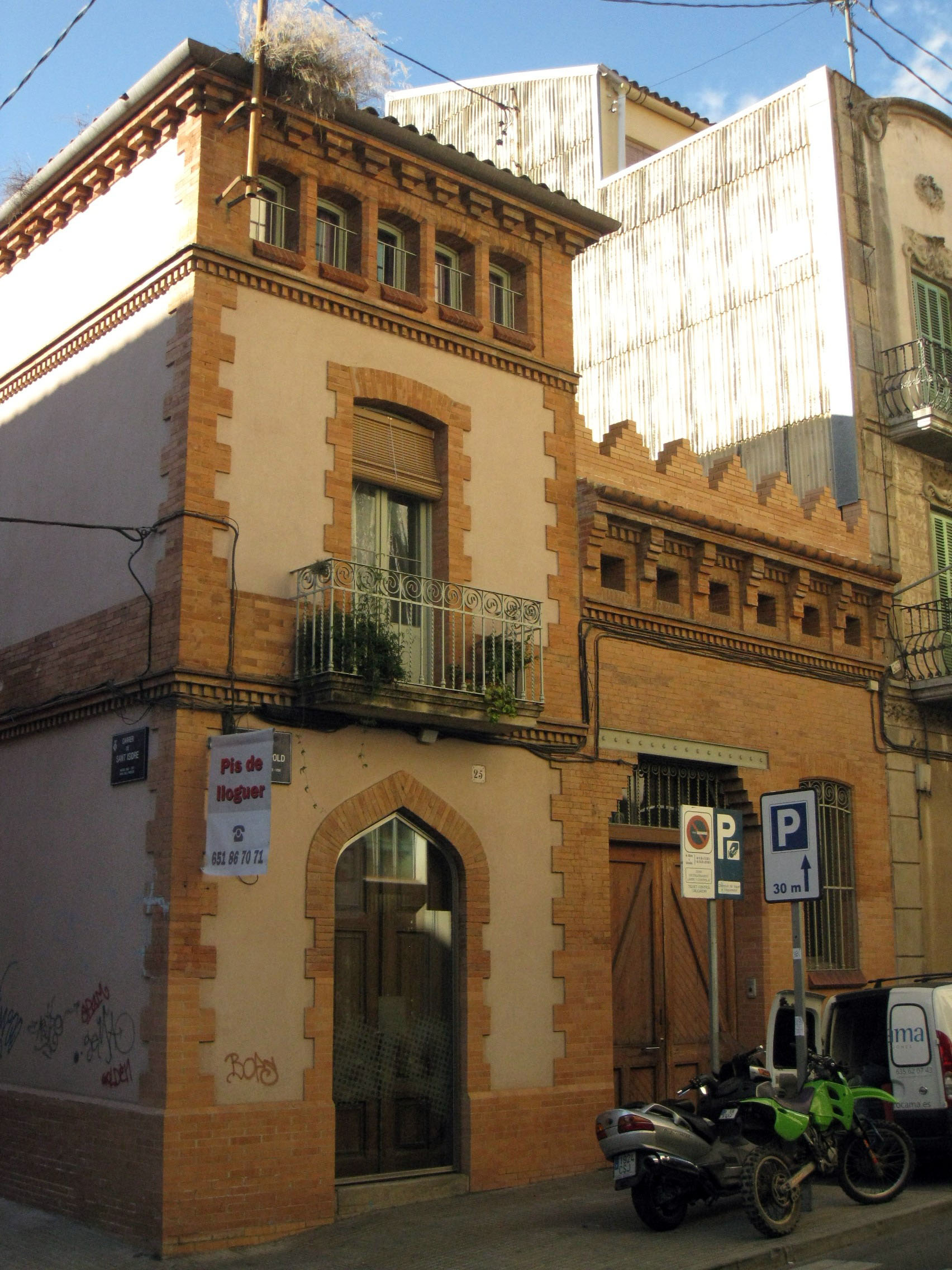 Casa i magatzem Josep Casanovas, edificis contigus modernistes de Lluís Muncunill de 1898 situats al carrer de Sant Leopold núm. 25-27 (Terrassa).